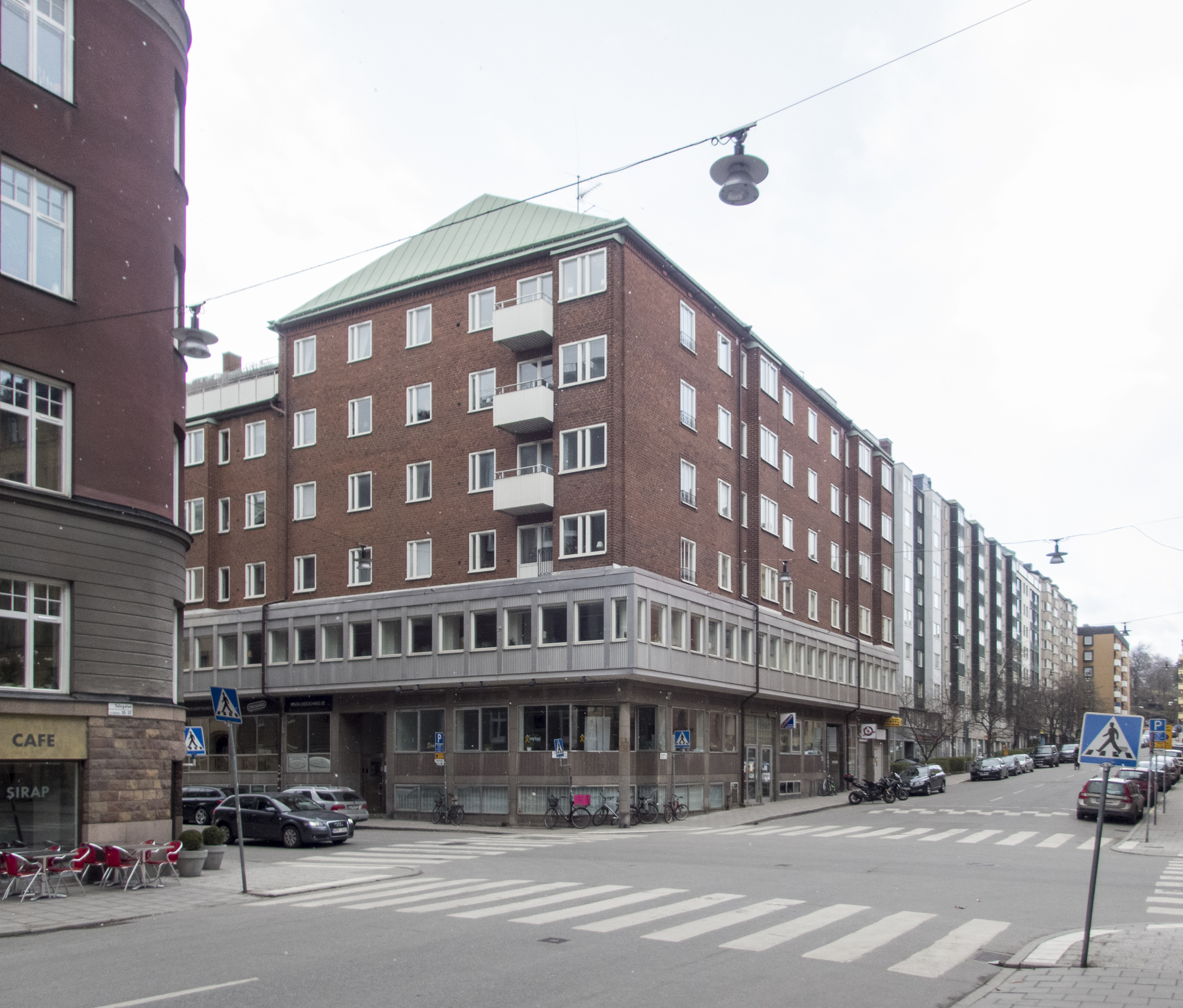 Geten 4, Surbrunnsgatan 30, Tulegatan 39 Stockholm Nybyggnadsår 1955 - 1957 Emil Bellman (Byggherre) Emil Bellman (Byggmästare) Hans Fries (Arkitekt)